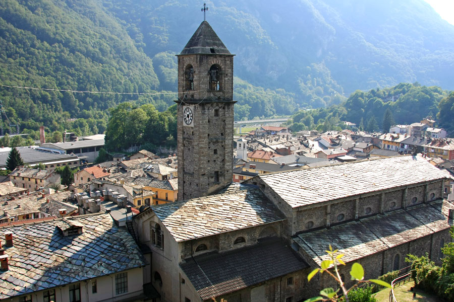 Veduta di Pont Canavese dal colle del castello